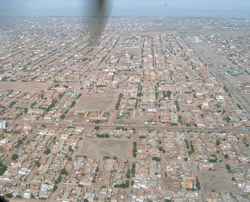 Картум из ваздуха, Аугуст 2005